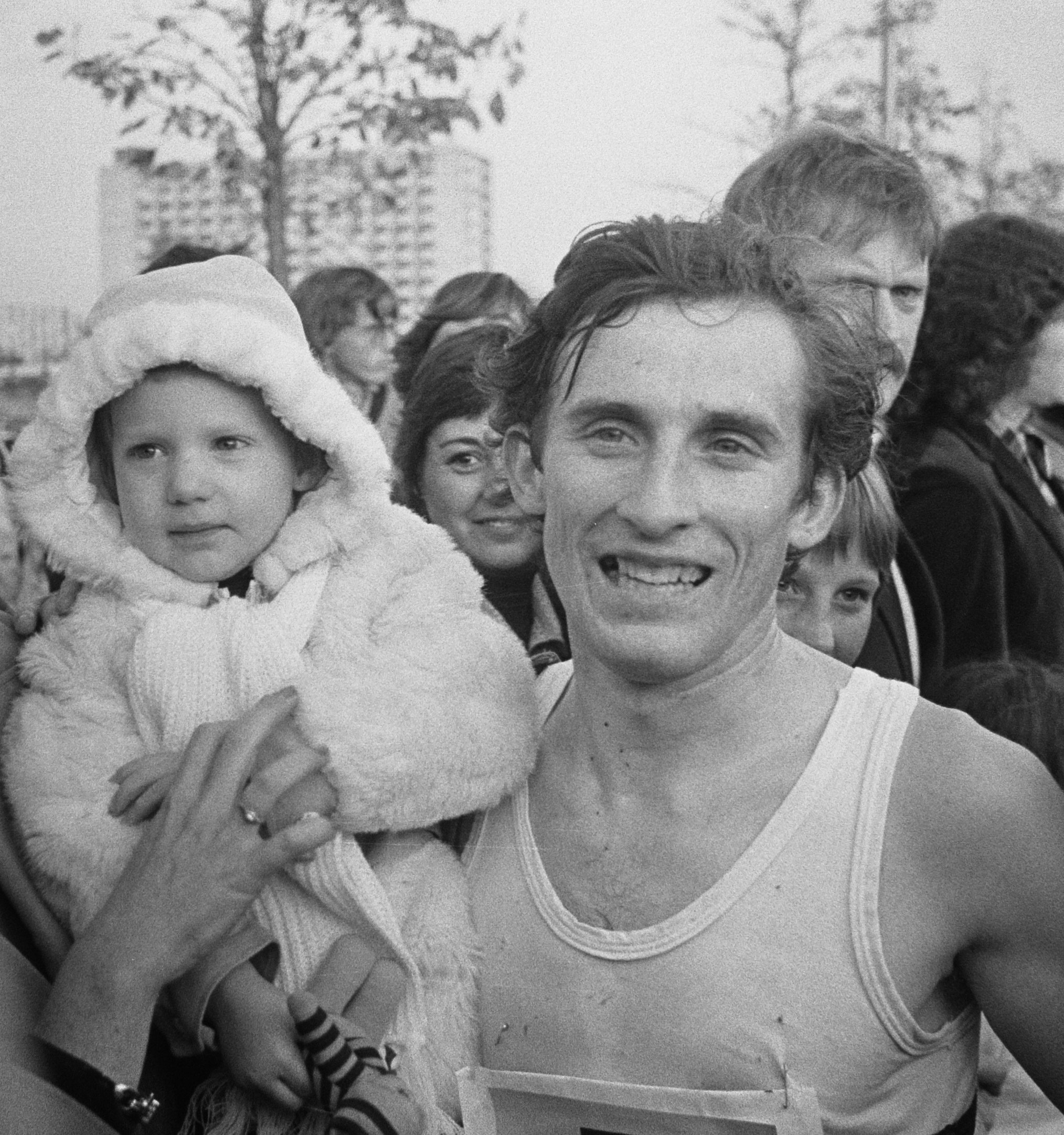 Boven t IJ loop in Amsterdam; Karel Lismont met vrouw en kind